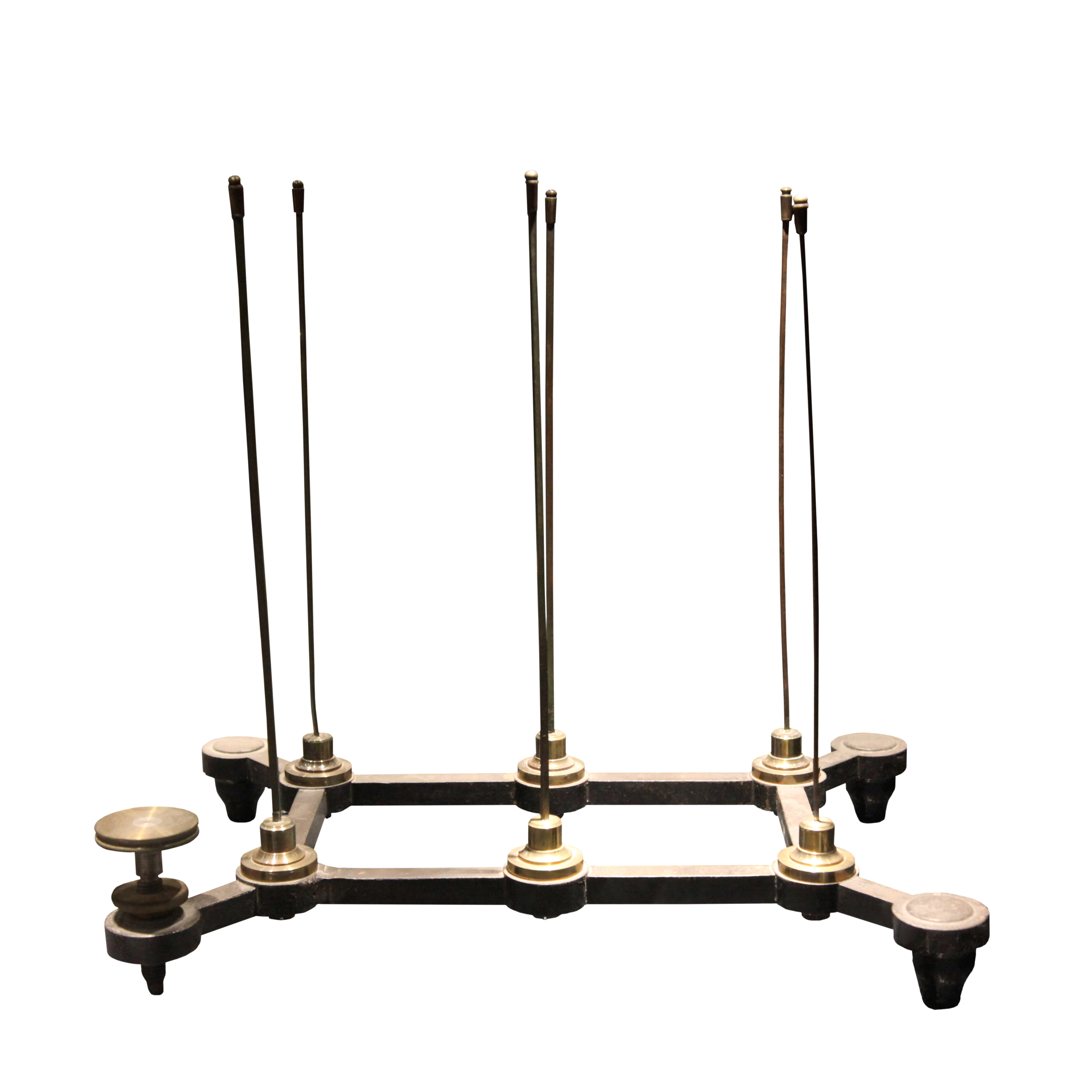 Kaleidophone on display at Palais de la Découverte in Paris